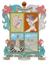 Consta de cuatro campos: en el primer campo aparece el plano o croquis actual del municipio, con un pendón, un arco y una macana, elementos bélicos característicos de los guerreros tarascos. Representa en su conjunto la victoria que obtuvieron sobre los aztecas. En el segundo campo, aparecen dos manos y un pergamino, teniendo como fondo el monumento o guía de la Ruta de la Independencia. Significa el hecho histórico ocurrido en Indaparapeo el día 20 de octubre de 1810, en que el Padre de la Patria, Don Miguel Hidalgo y Costilla, entrega el nombramiento al Generalísimo Morelos para insurreccionar en las costas del sur. En el tercer campo, aparece un arado, teniendo en la parte central una mazorca entrelazando el arado. Representa la agricultura que es la actividad más importante del municipio. En el cuarto campo, aparece una figura de fábrica, un pino y un manantial, que significan la industrialización del municipio, así como los atractivos turísticos más frecuentados del municipio. En su parte inferior aparece un listón con el lema "Trabajo, Justicia, Saber y Libertad", en tanto que en su parte superior aparece una antorcha y la palabra "Indaparapeo". Diseñadores: Mario Chávez López, Ramón López Soria y Fernando Martínez Pozos.